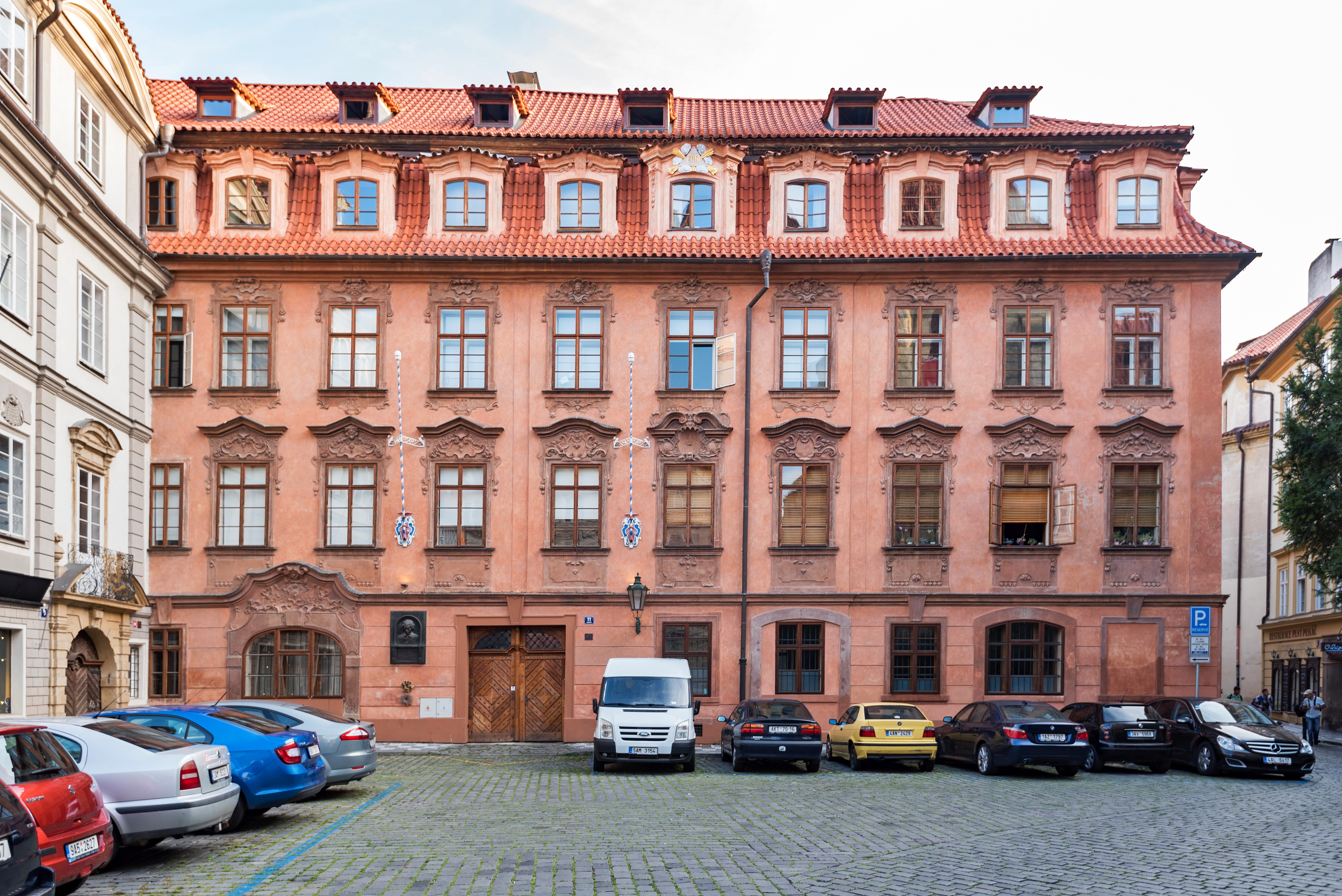 Praha 1, Lázeňská 285-11